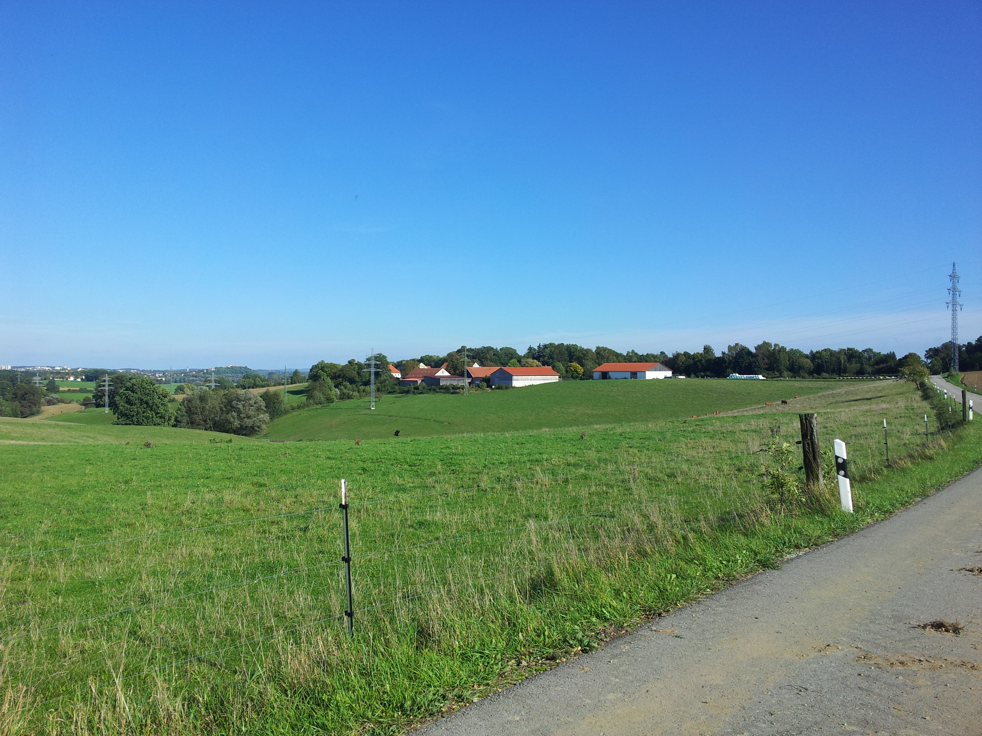 Lageltshausen; Ortsteil von Freising